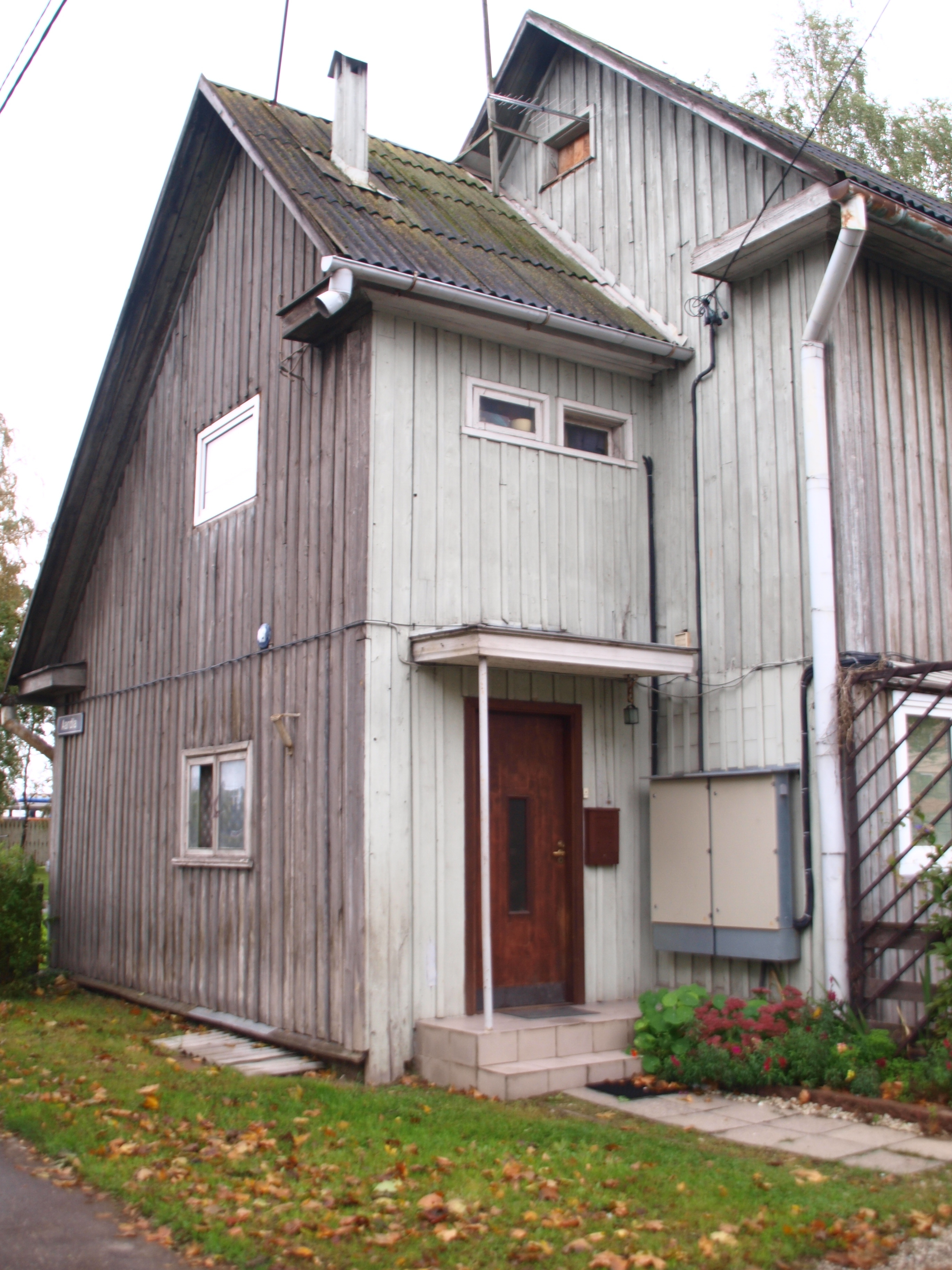 Ridaelamu Tartus Aardla 19, 1927-1928.a.